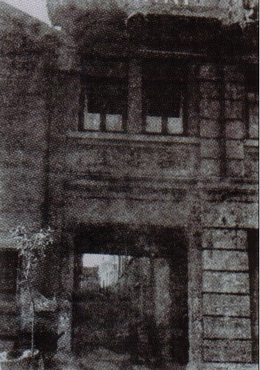 天津革命党人军事司令部旧址（西开教堂附近吉祥里，已拆除）